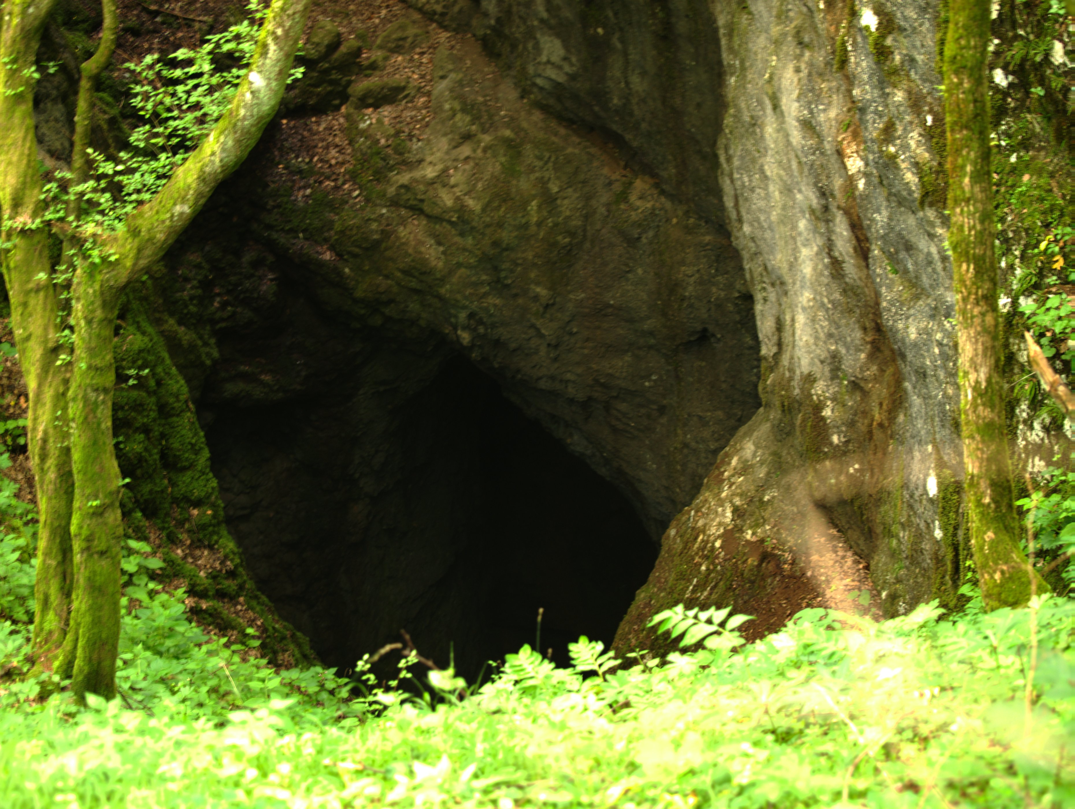 Mejame - Dane pri Divači